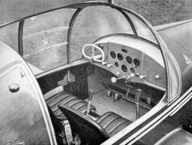 Kabina letounu Mráz M-3 Bonzo (1948)